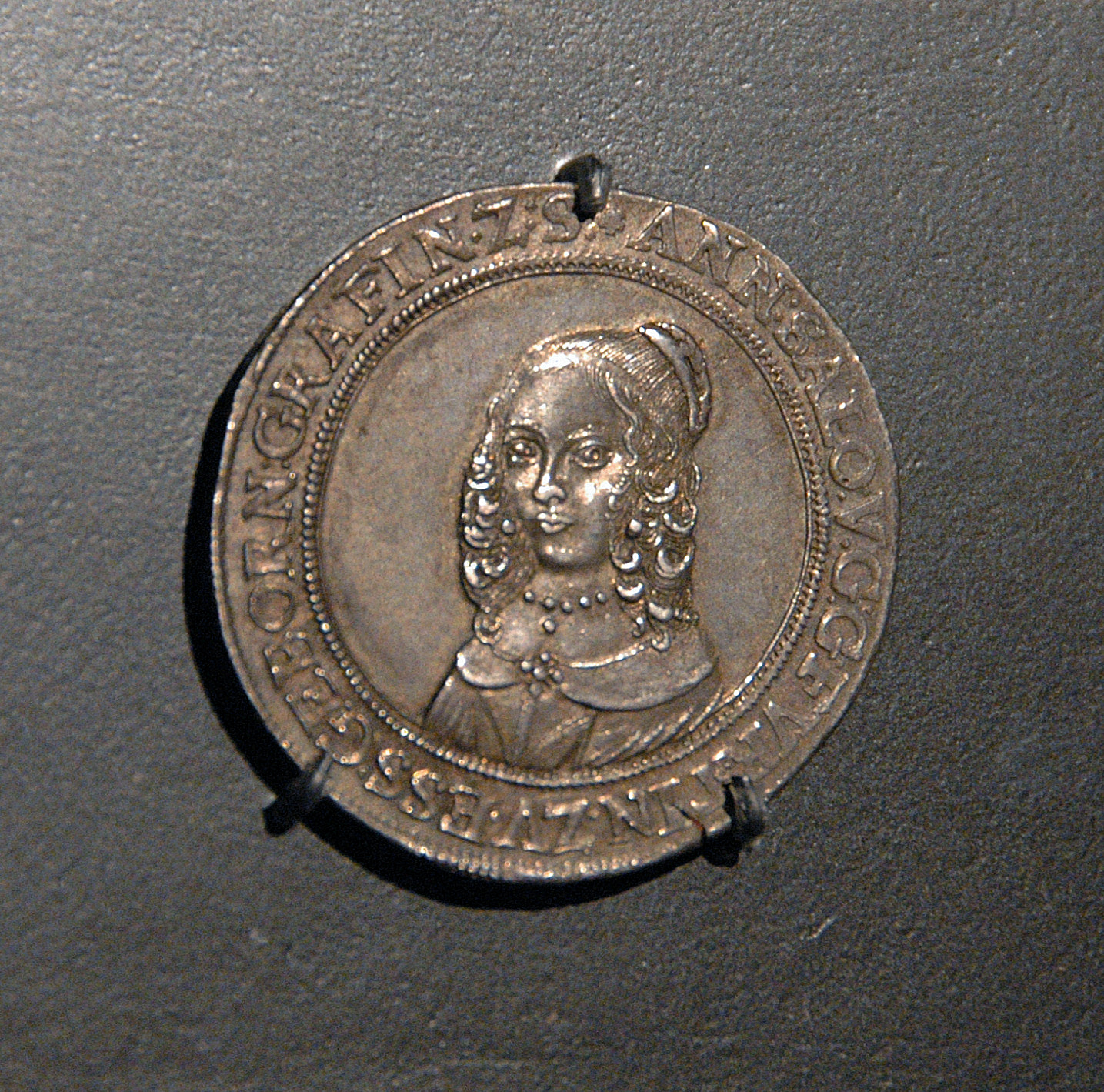 Taler der Essener Äbtissin Anna Salome von Salm-Reifferscheidt mit ihrem Brustbild